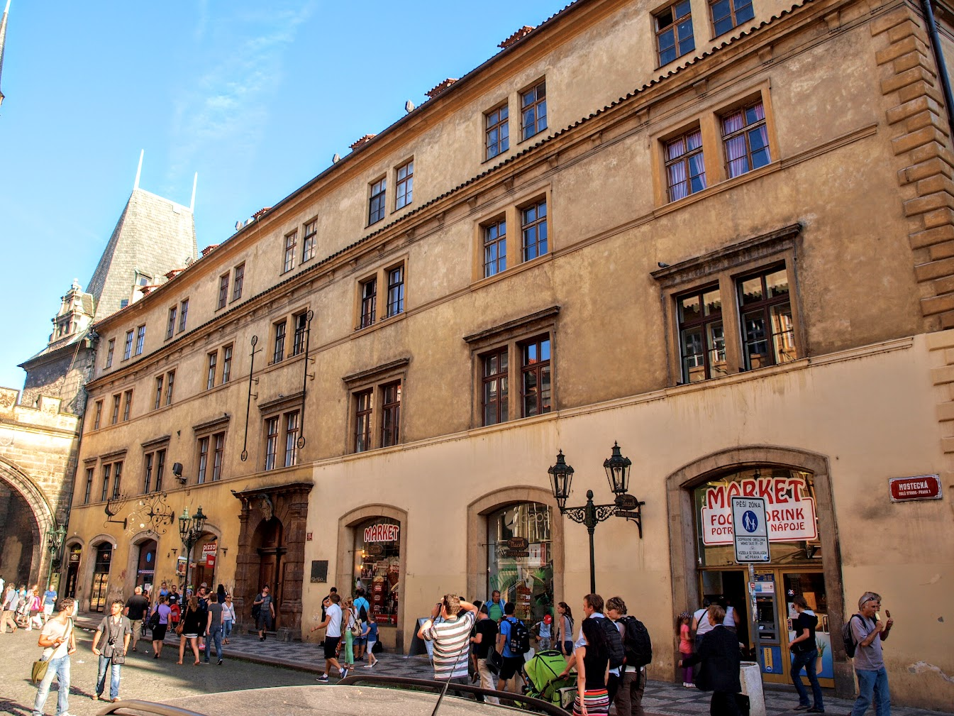 Saský dům na Malé Straně v Praze